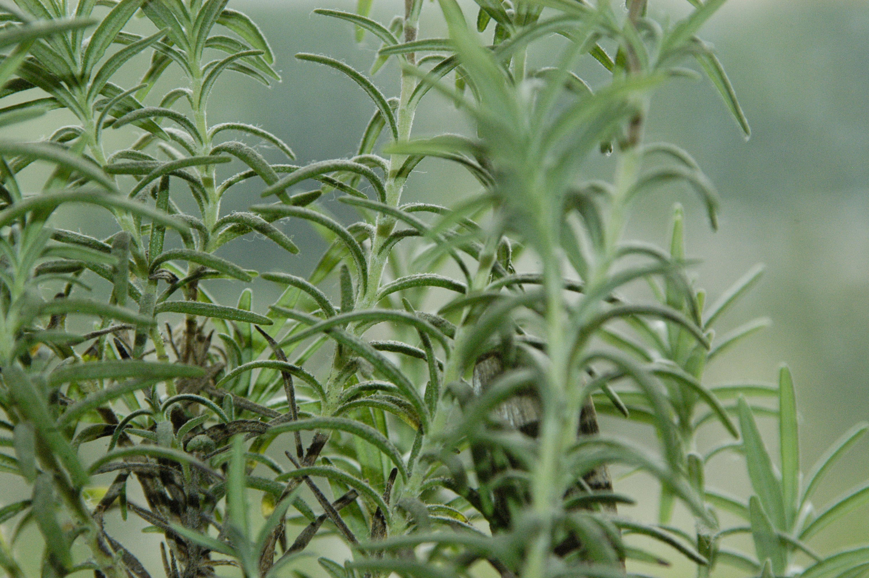 Розмарин